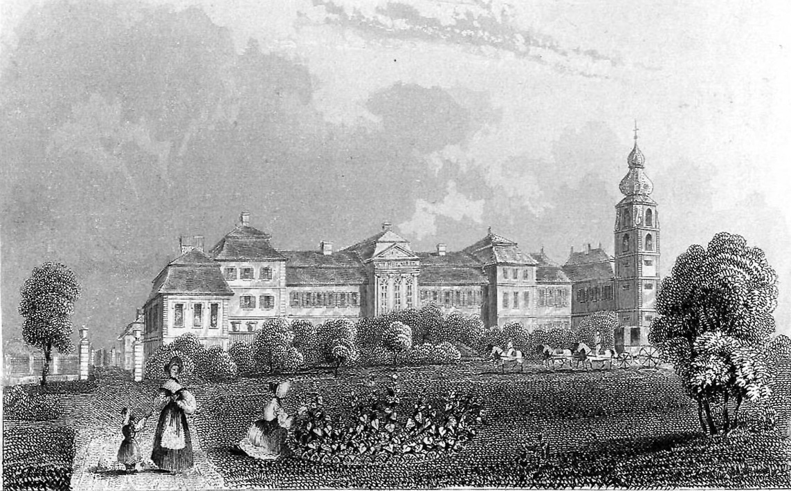 Schloss Fasanerie